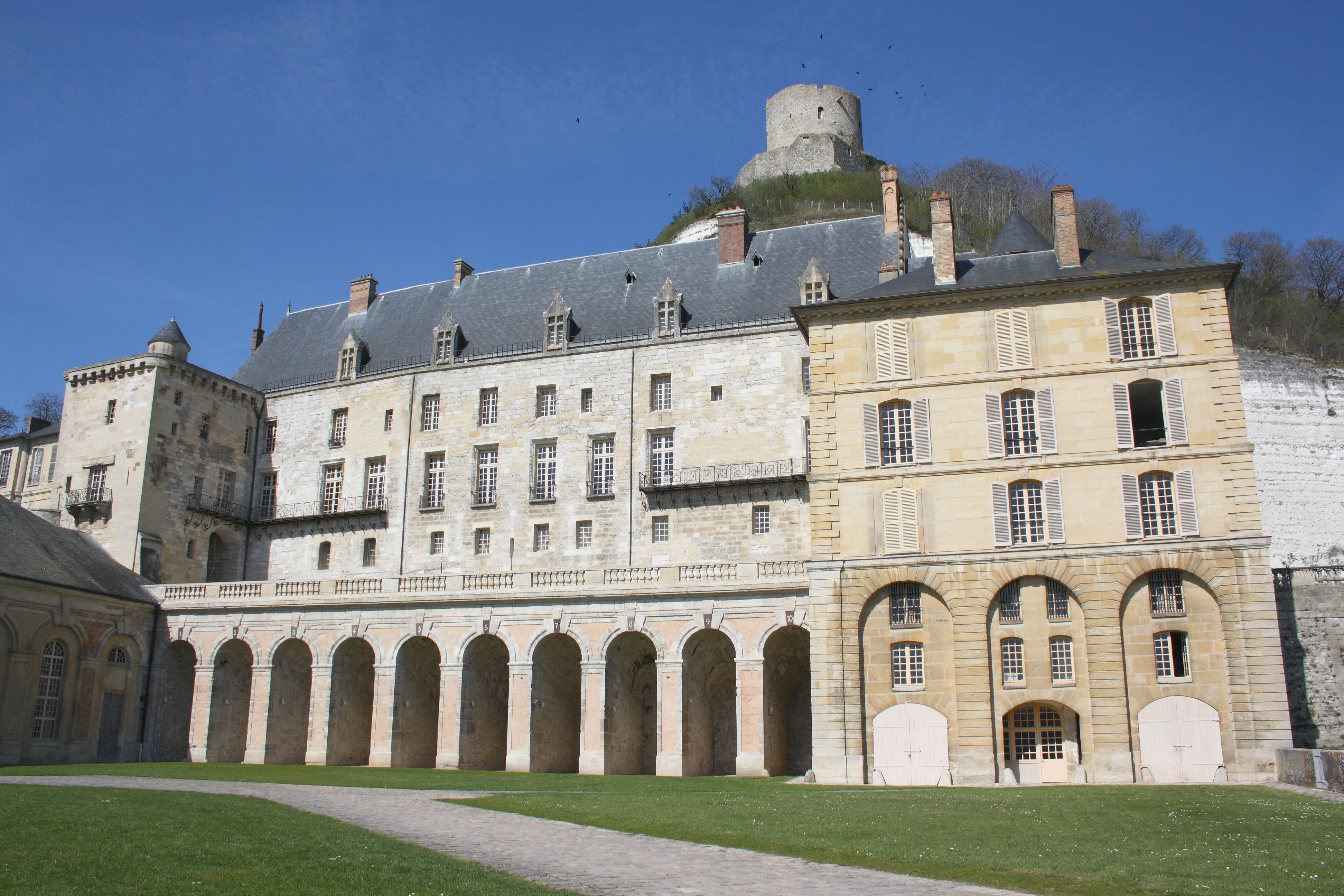 Schloss in La Roche-Guyon